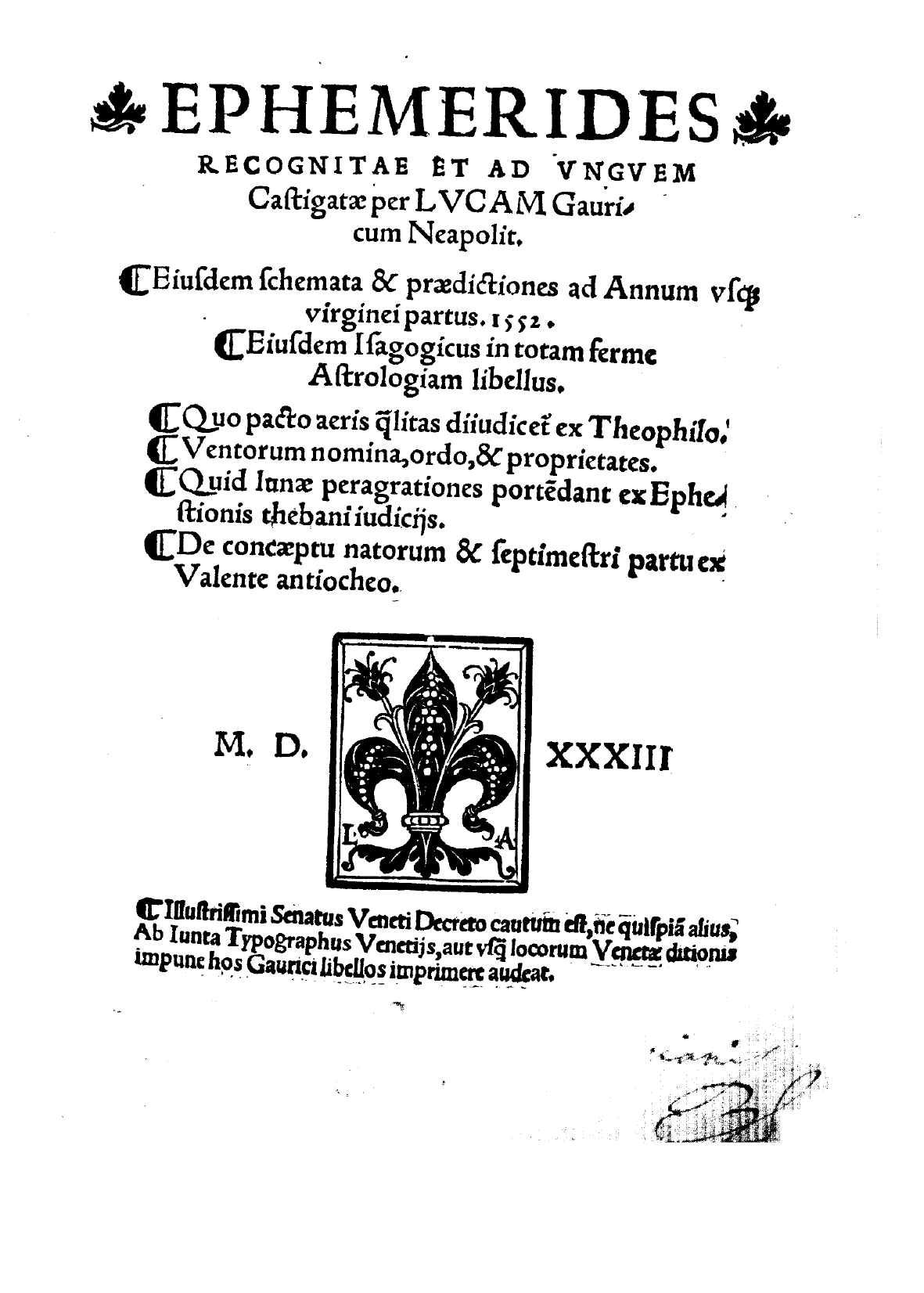 Ephemerides recognitae et ad vnguem castigatae per Lucam Gauricum Neapolit. Eiusdem schemata & praedictiones ad annum vsque virginei partus 1552. Eiusdem Isagogicus in totam ferme astrologiam libellus. .... - [Venezia : Lucantonio Giunta], 1533 (... in florentissima urbe Veneta, ... : ... sumptibus Lucæntonij Iuntae typographi, ... 1533). - [310] c. : ill., tab. ; 4º .